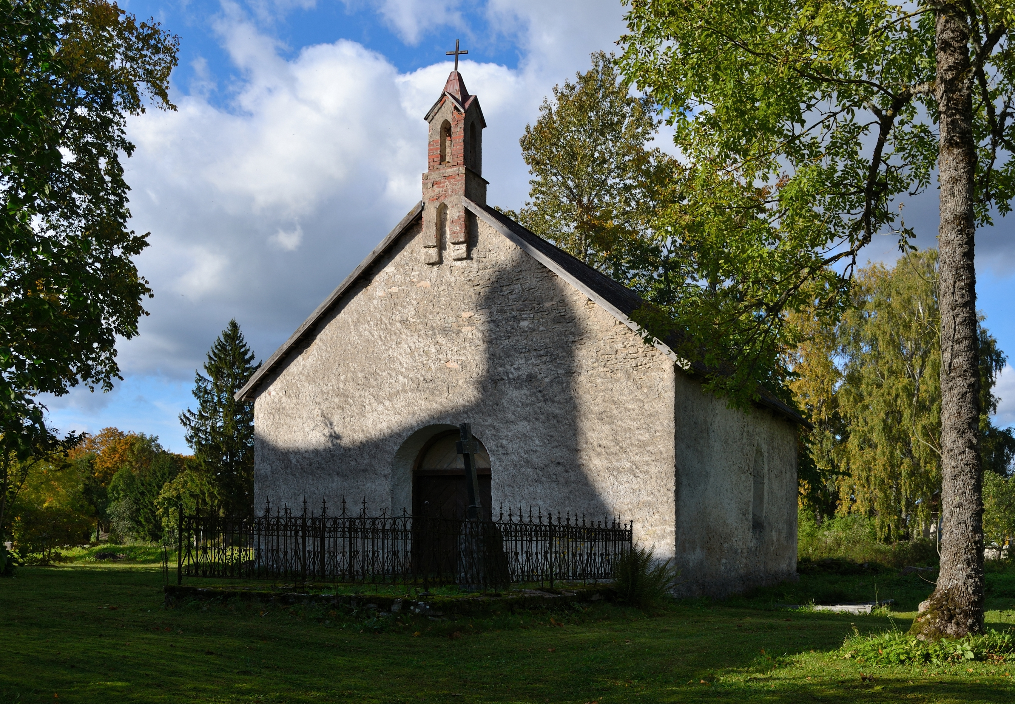 Juuru kirikaia kabel